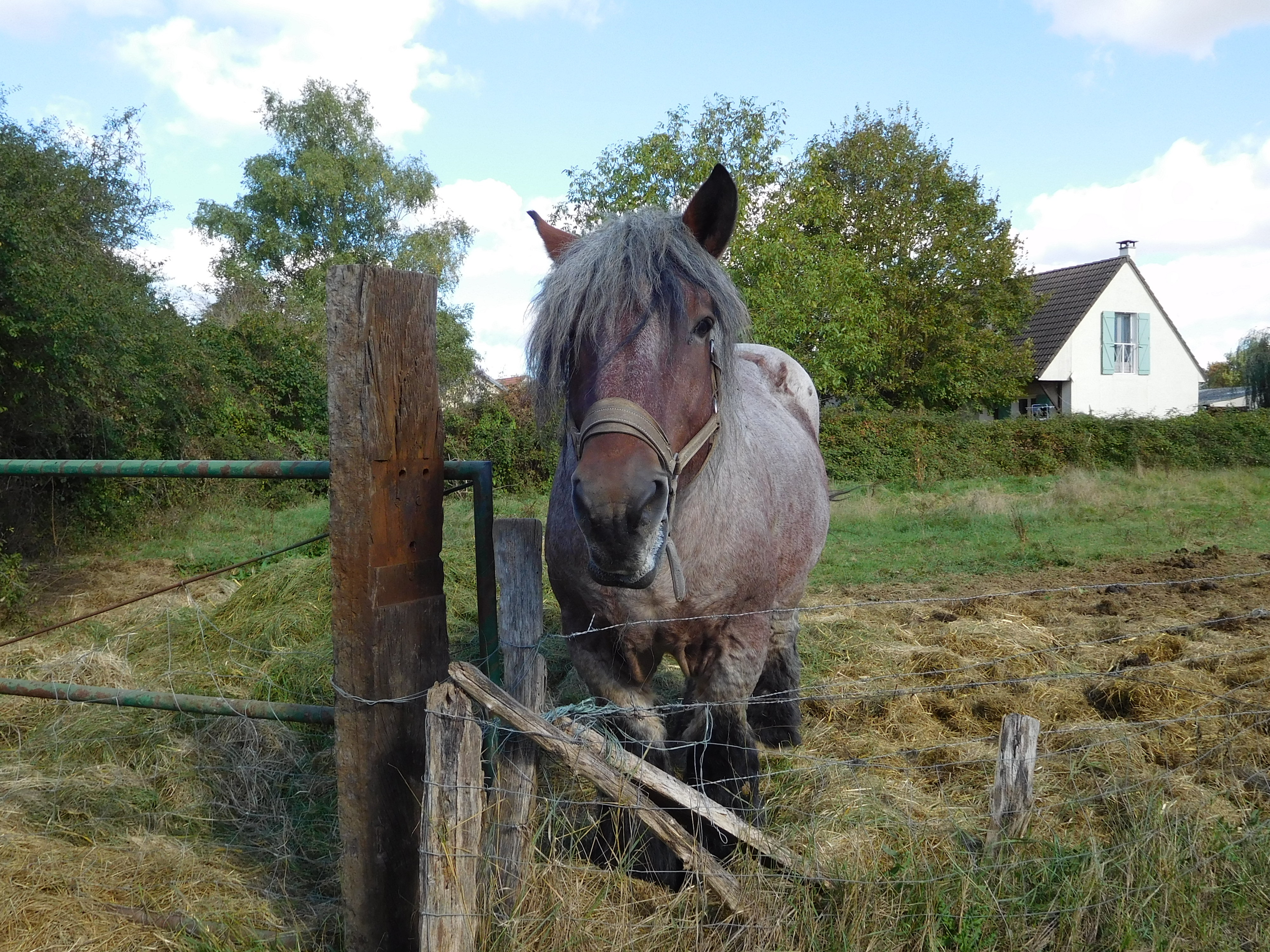 Trait auxois, à la ferme du Port Aubry, près de Cosne-Cours-sur-Loire.